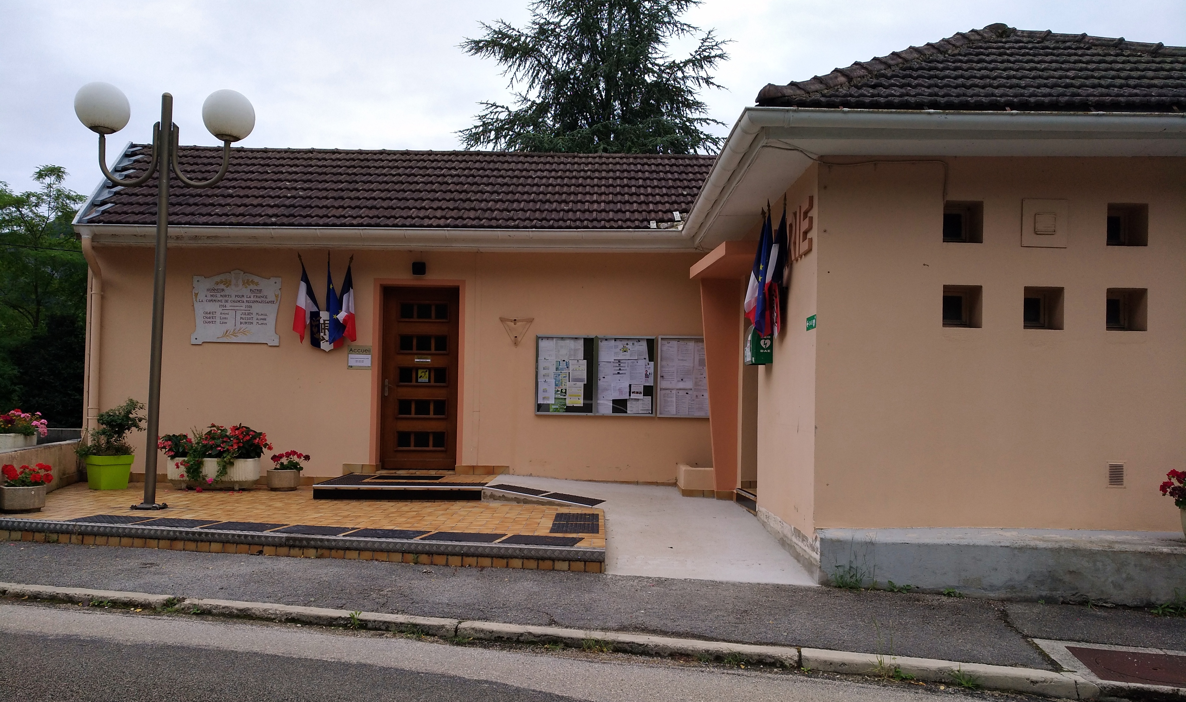 Mairie, monument aux morts et défibrillateur à Chancia (Jura, France).